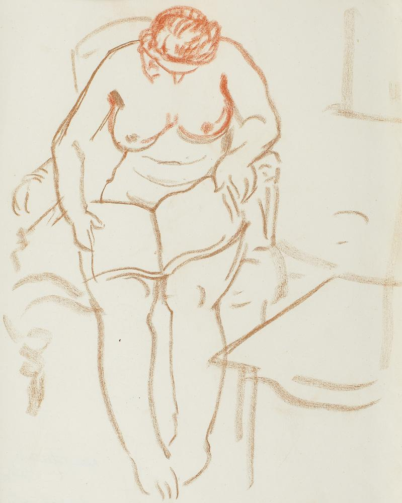 Nicolae Tonitza - Lectură, creion conte și sagvină pe hârtie, 26,5 x 21 cm.